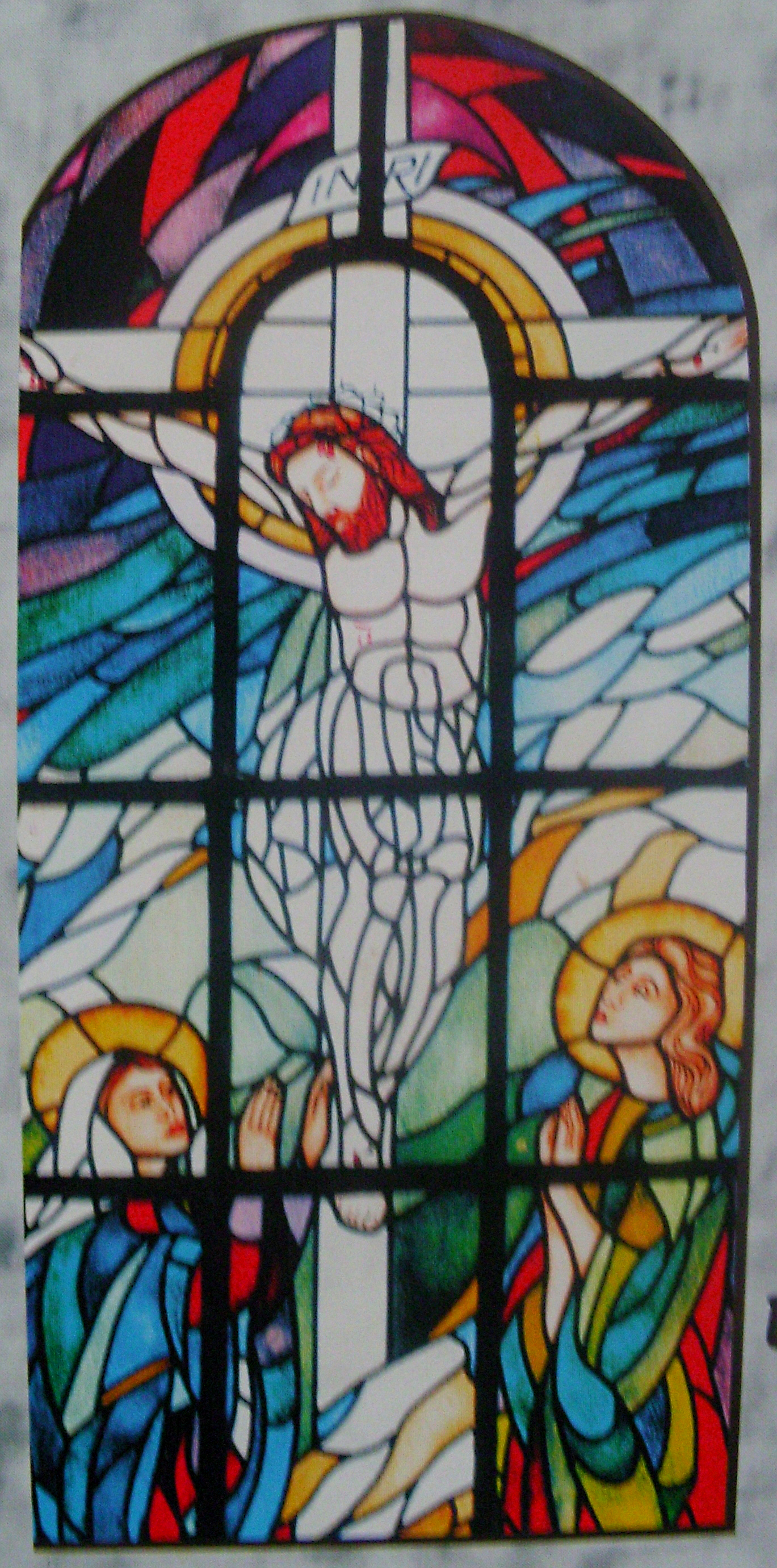 Ukrzyżowanie - witraż w kościele Imienia Maryi w Bączalu Dolnym (diecezja rzeszowska)